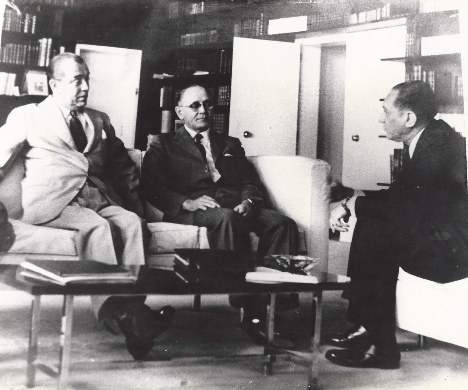 Presidente da República Juscelino Kubitschek, governador da Paraíba José Fernandes de Lima e senador Ruy Carneiro no Palácio do Planalto em 1960.